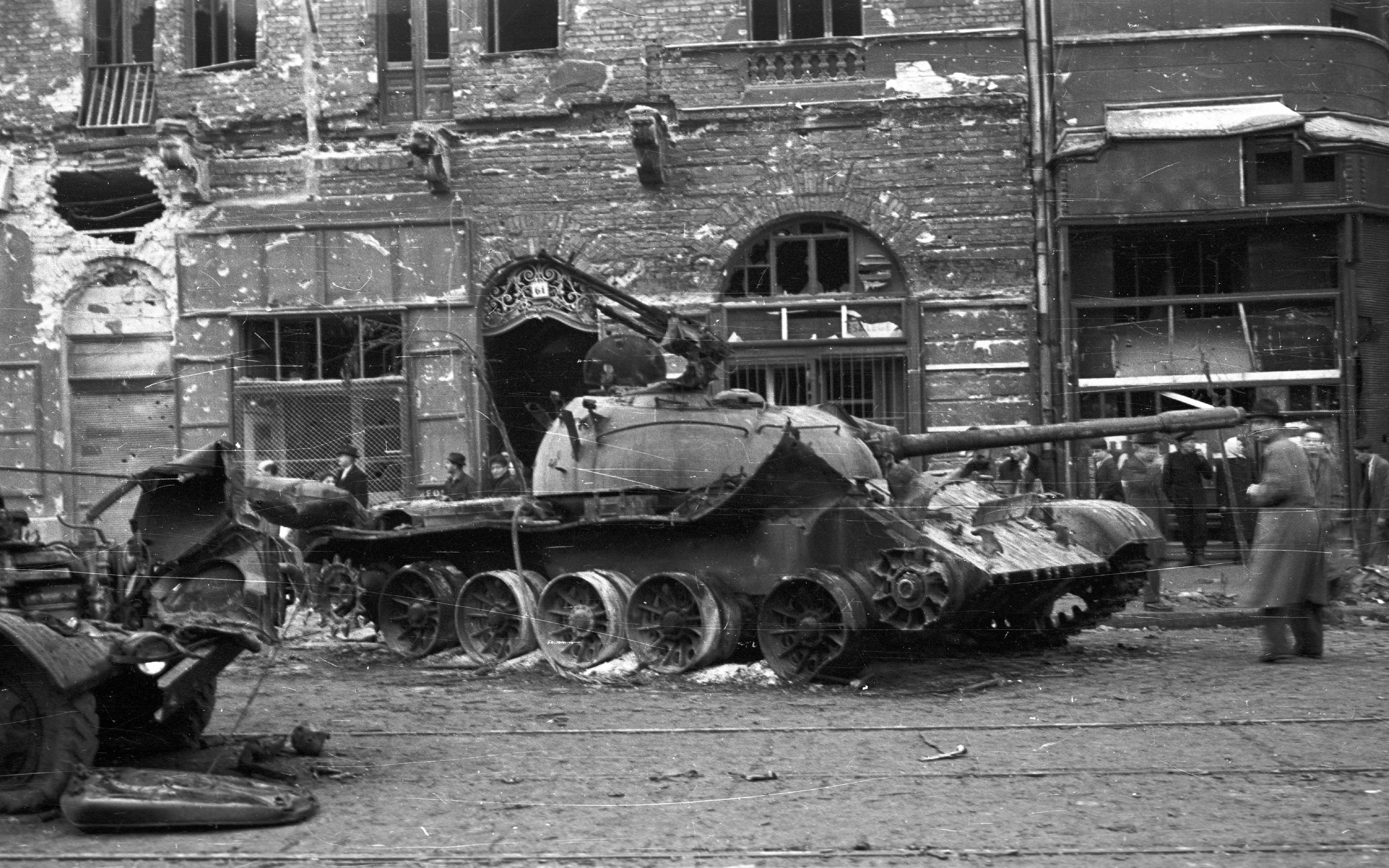 Üllői út 61. T-54-es harckocsi. Location: Hungary, Budapest IX. Tags: tank, Soviet brand, wreck, damaged building, revolution, war damage, commercial vehicle, Budapest Title: Üllői út 61. T-54-es harckocsi.